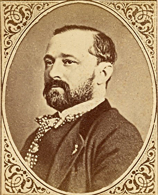 Contretype d'un cliché de Ponson du Terrail paru dans le journal "Le Figaro" au milieu du XIXe siècle